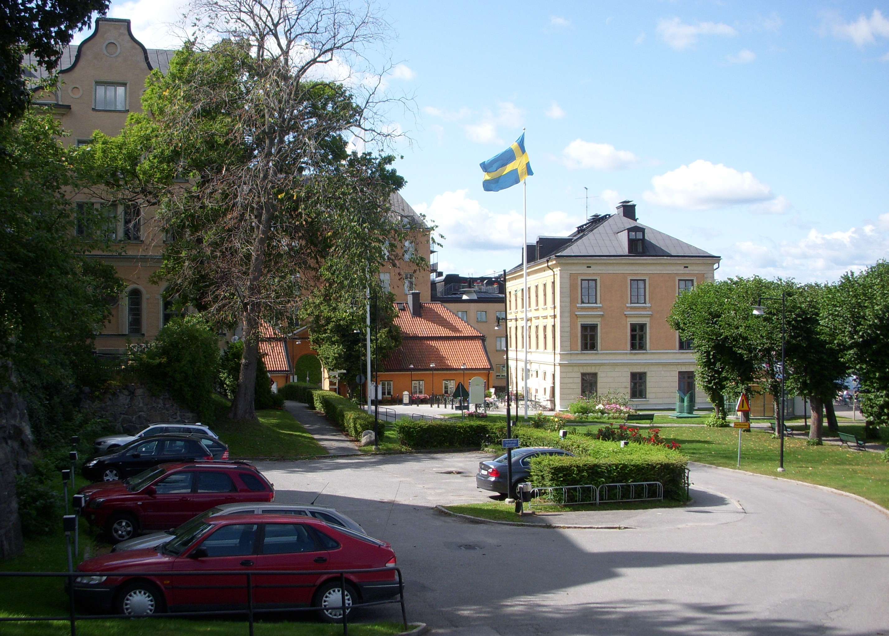 Ersta malmgård på Södermaln i Stockholm (Ersta diakoni)